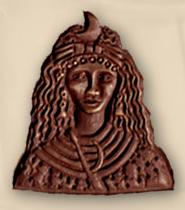 Bassorilievo Regina Califia